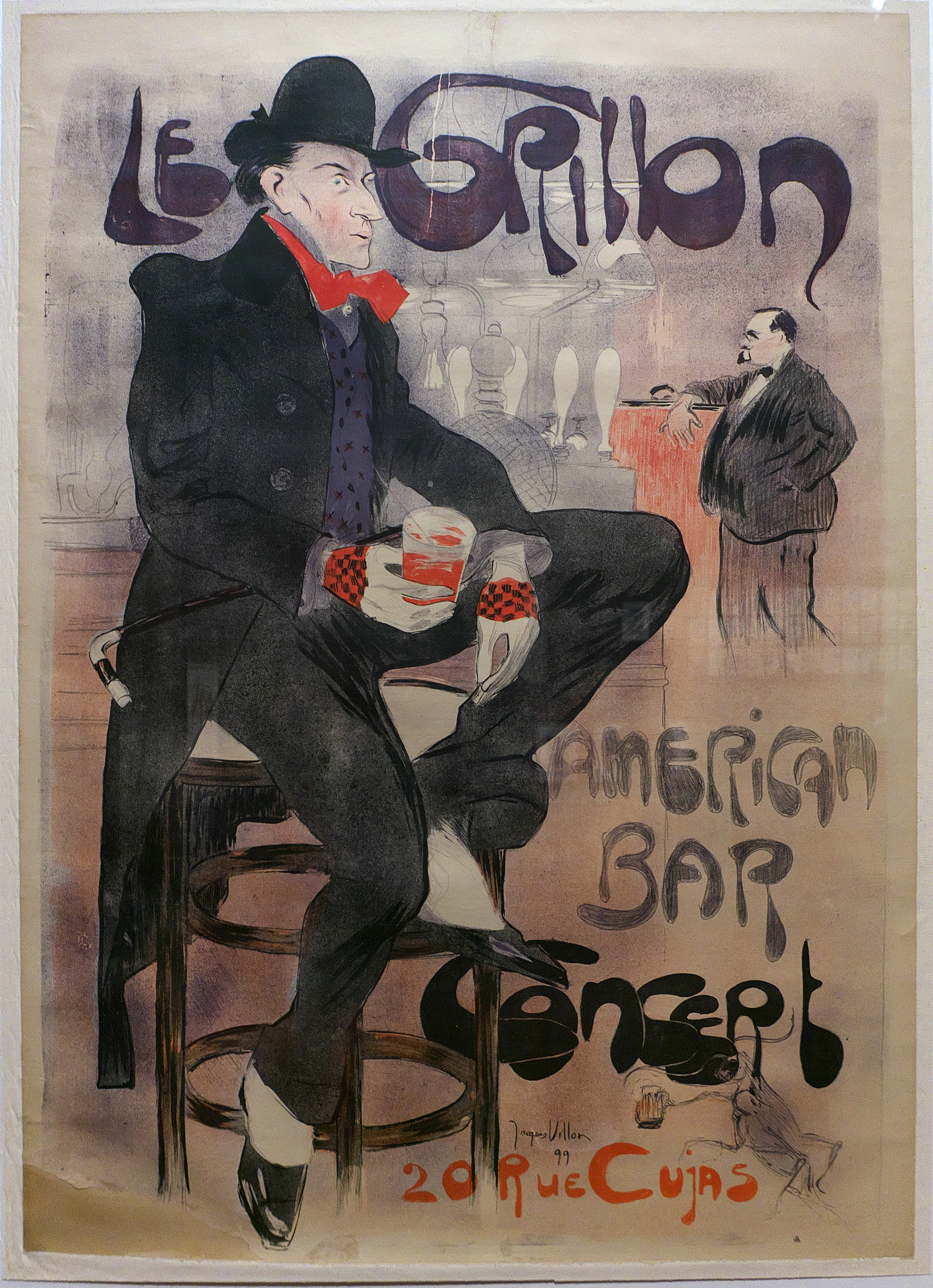 Litografía de Jacques Villon (1899), cartel anunciador para un concierto en el bar americano Le Grillon.